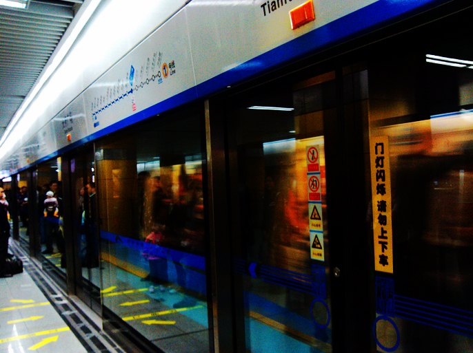 中文（中国大陆）: 天府广场站一号线站台